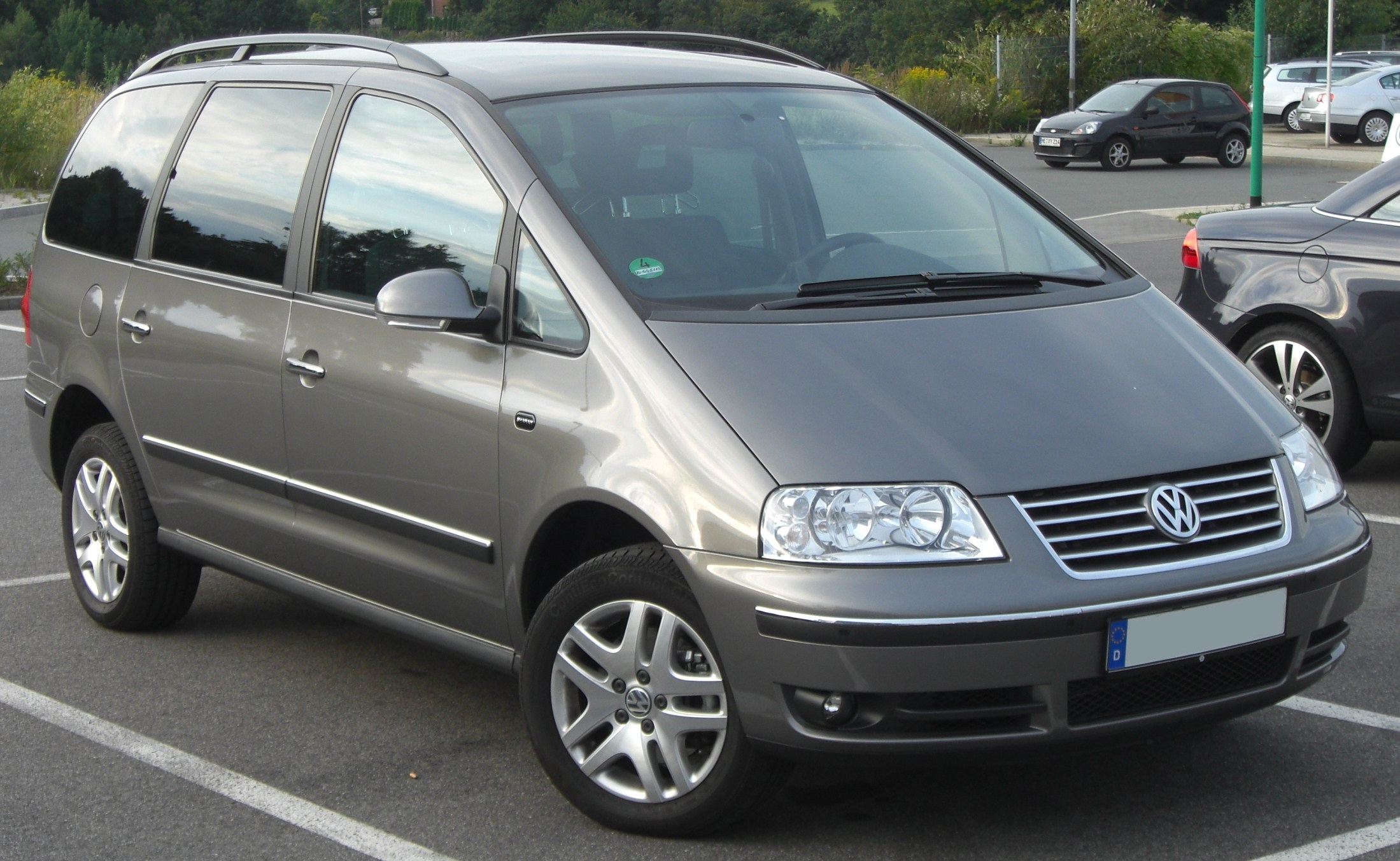 VW Sharan